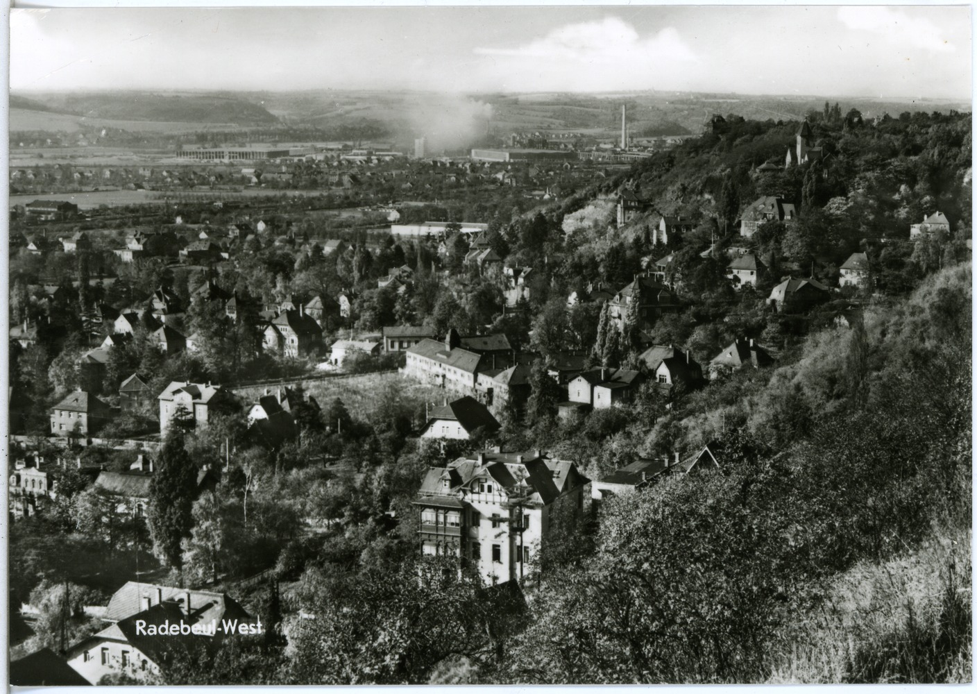 Radebeul; Blick auf Radebeul-West This postcard is from publisher Brück & Sohn in Meißen ( postcard has a unique number 30012 and is available in a higher resolution at the publisher. This images was uploaded in a cooperation project between Wikipedians and the publisher.